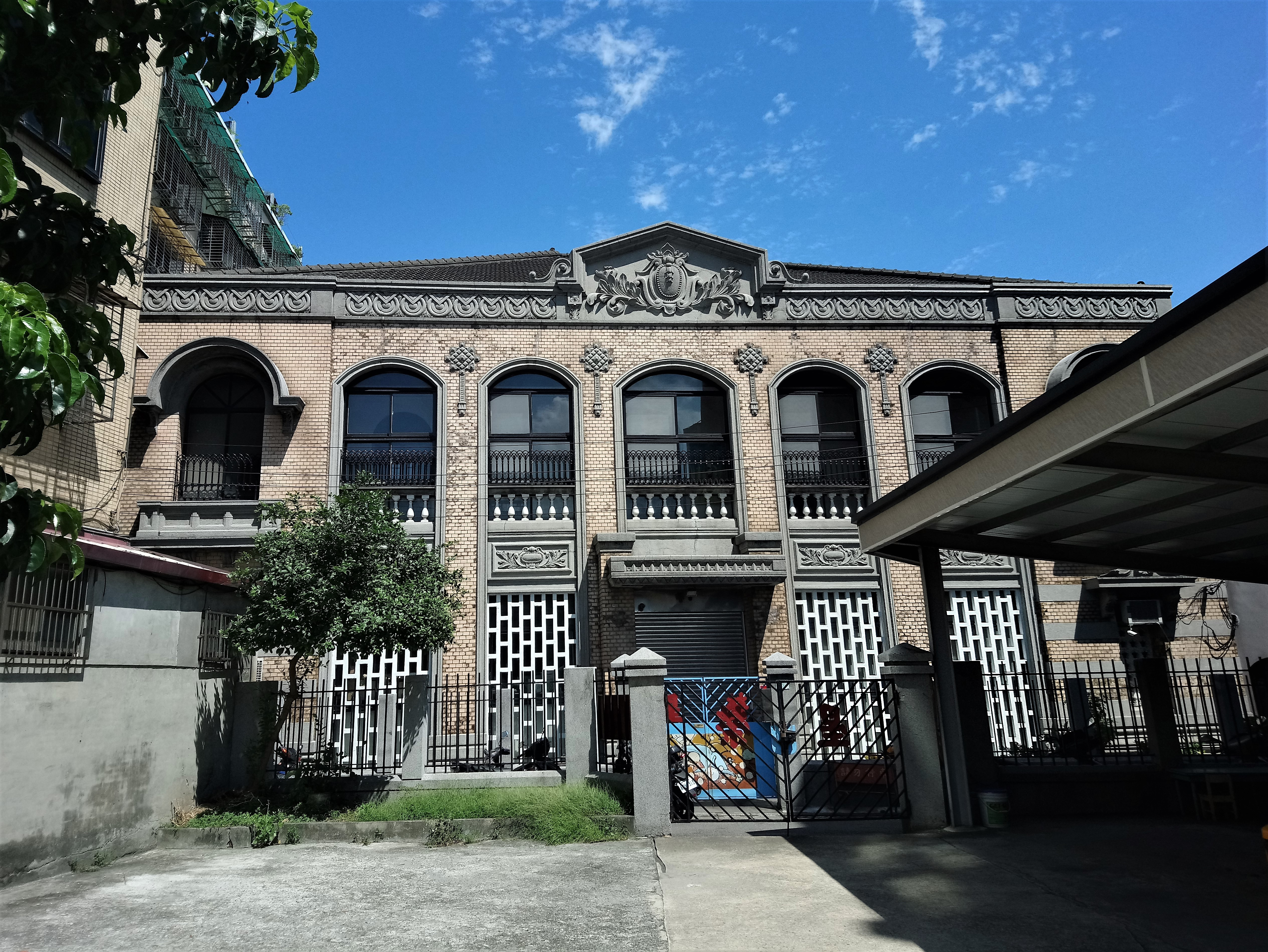 大稻埕辜宅,台北市大同區延平次分區大有里